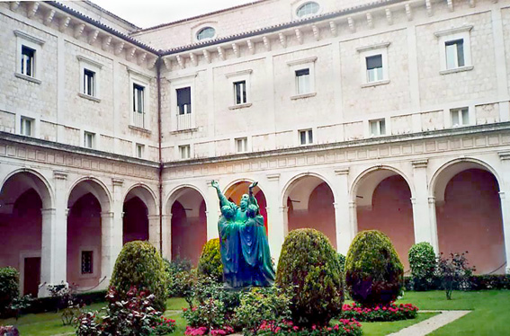 Abbazia di Montecassino